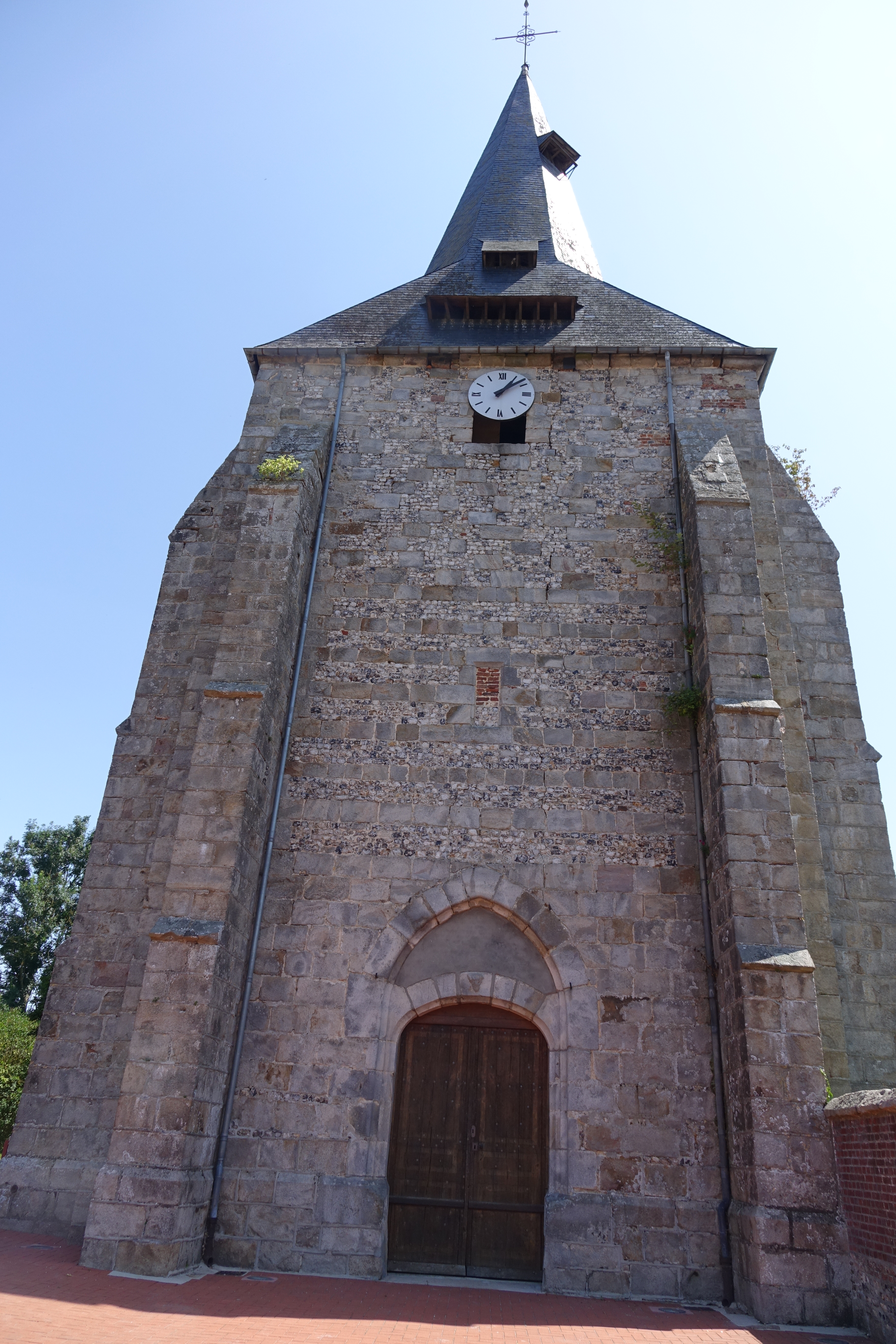 Église de Torcy-le-Grand, Seine-Maritime, France